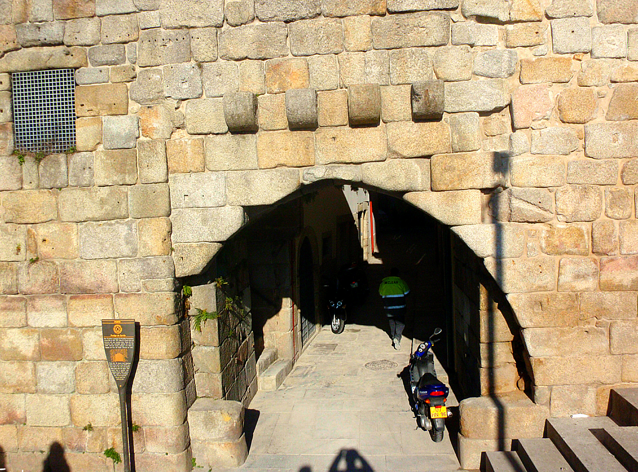 Porto (Portugal)